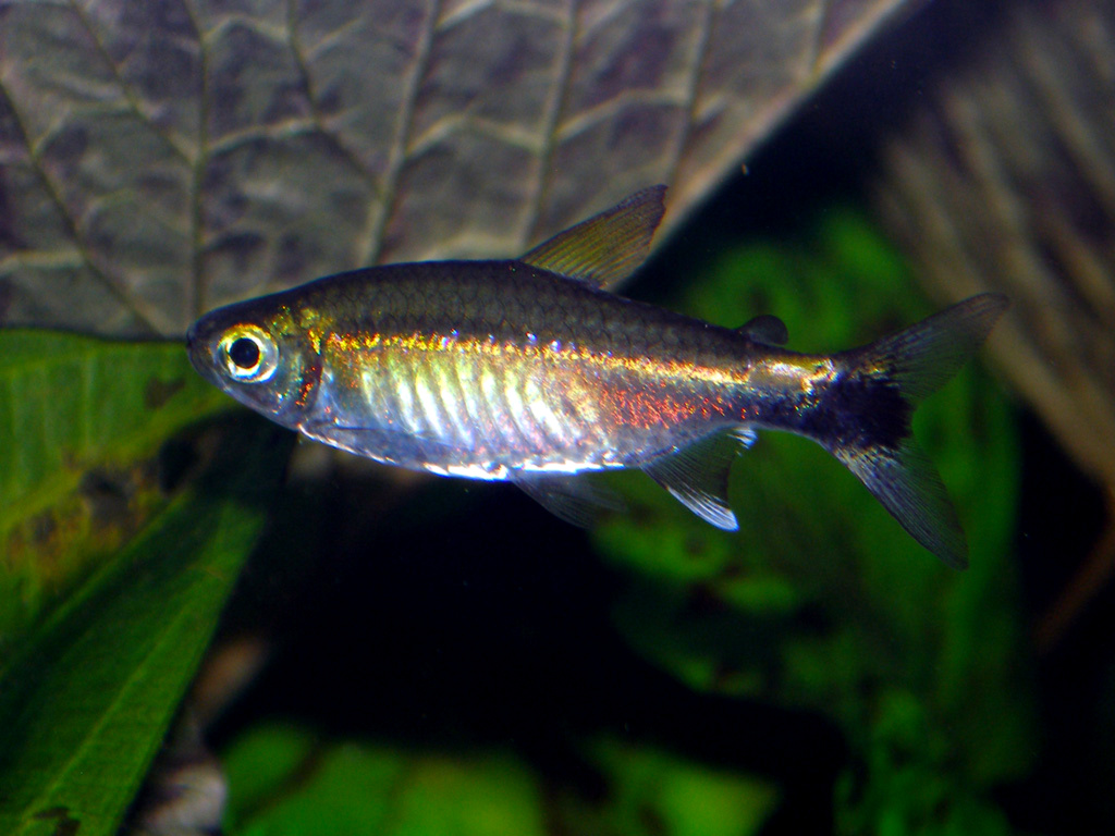 Hemigrammus hyanuary - Costellosalmler auch Grüner Neon im Aquarium